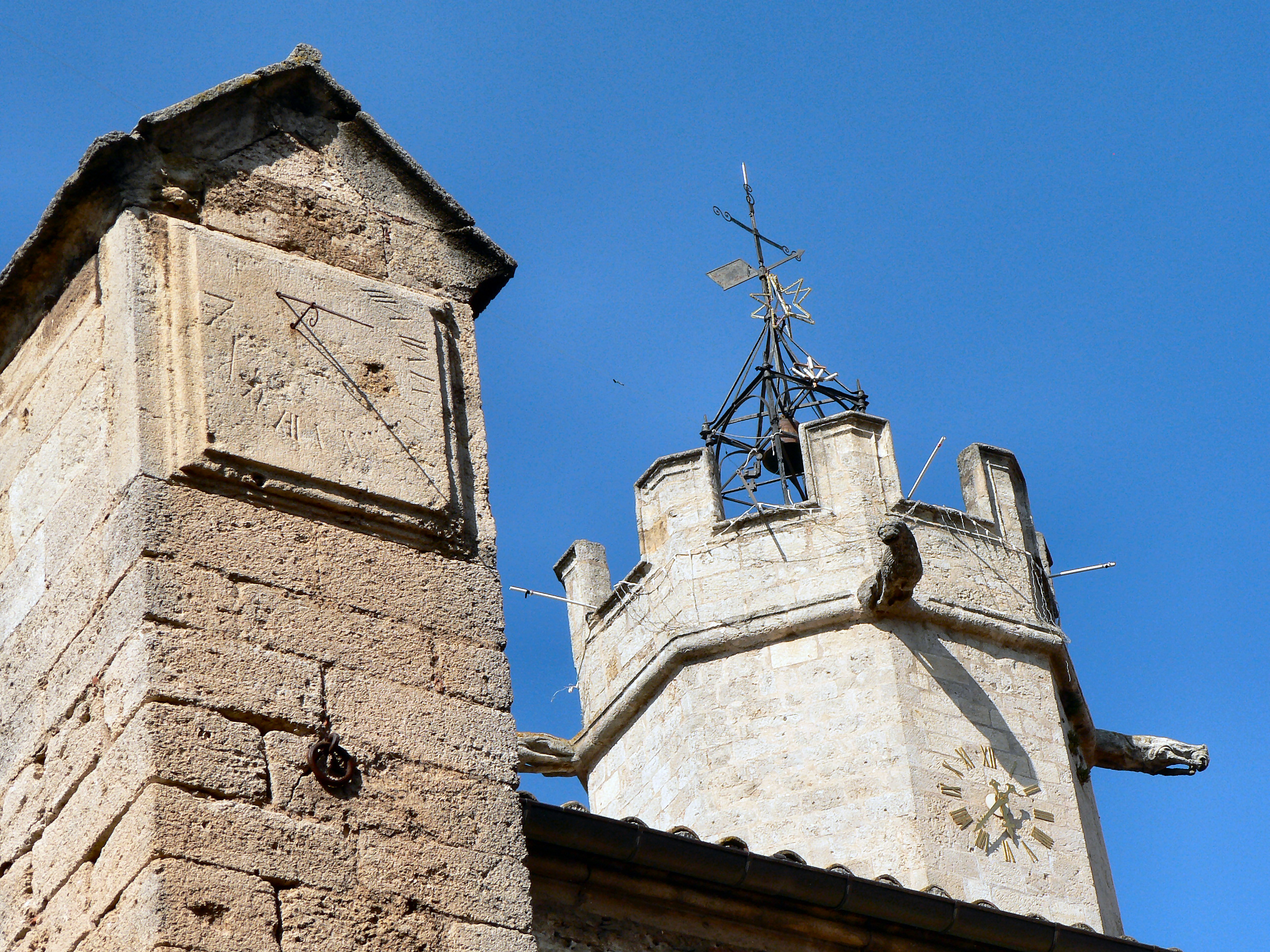 Couple cadran solaire vertical déclinant et horloge à Villeneuve-lès-Béziers